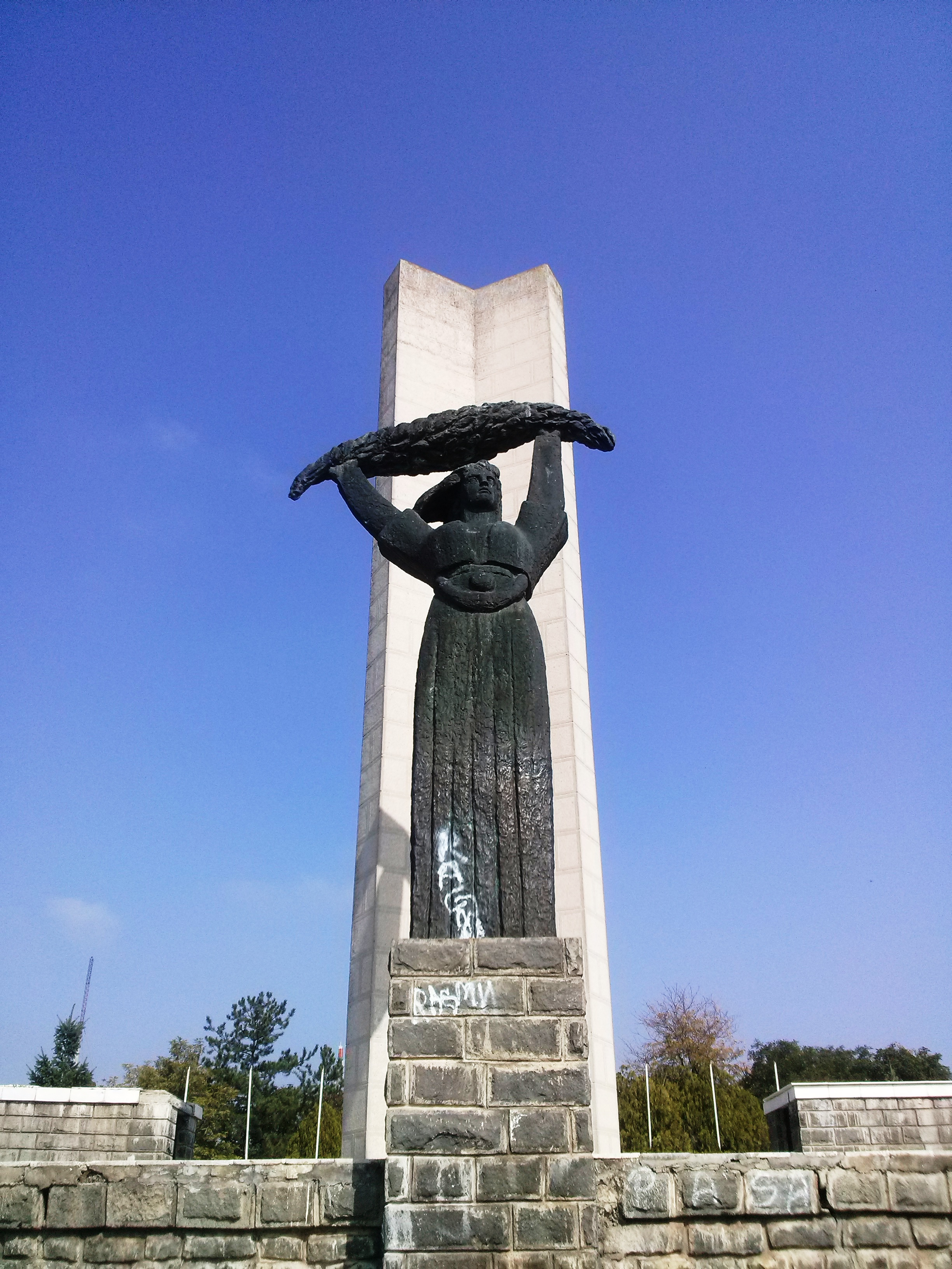 „Спомен костурница“, Куманово